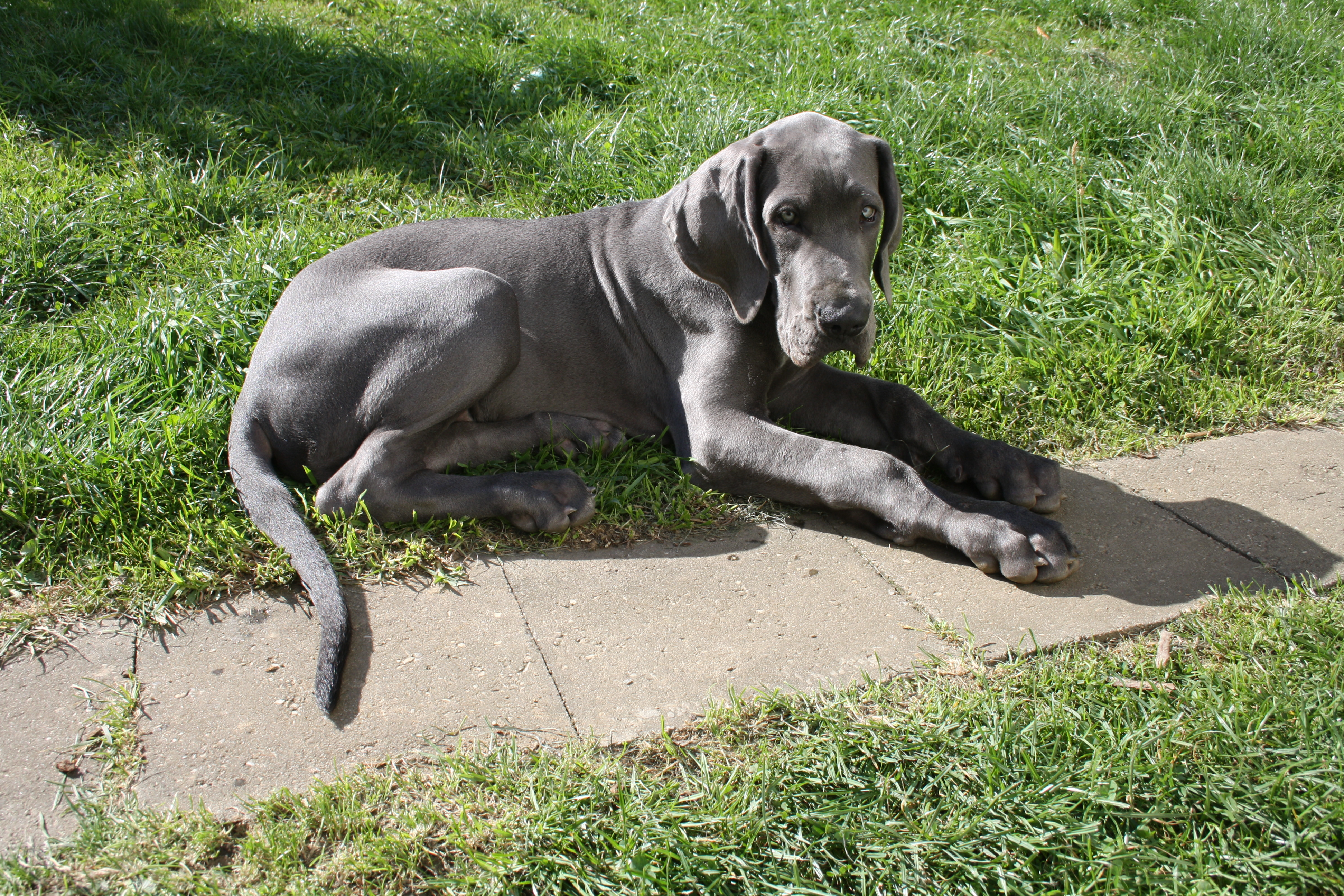 Deutsche Dogge Blau, 14 Wochen alt; Rüde Jim Beam Blue bi Korn´s (DDC/VDH), Wurftag: 9. Juni 2012